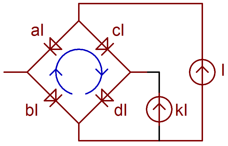 Применение транслинейного принципа к диодному мосту: задача: вывести зависимость токов диодов aI, bI, cI, dI от коэффициента k.